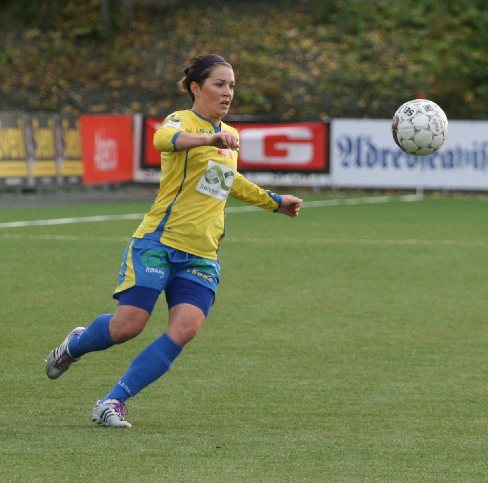 Fotballspilleren Synnøve Lindseth